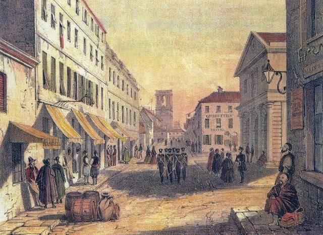 Griffiths Hotel Main Street Gibraltar.jpg